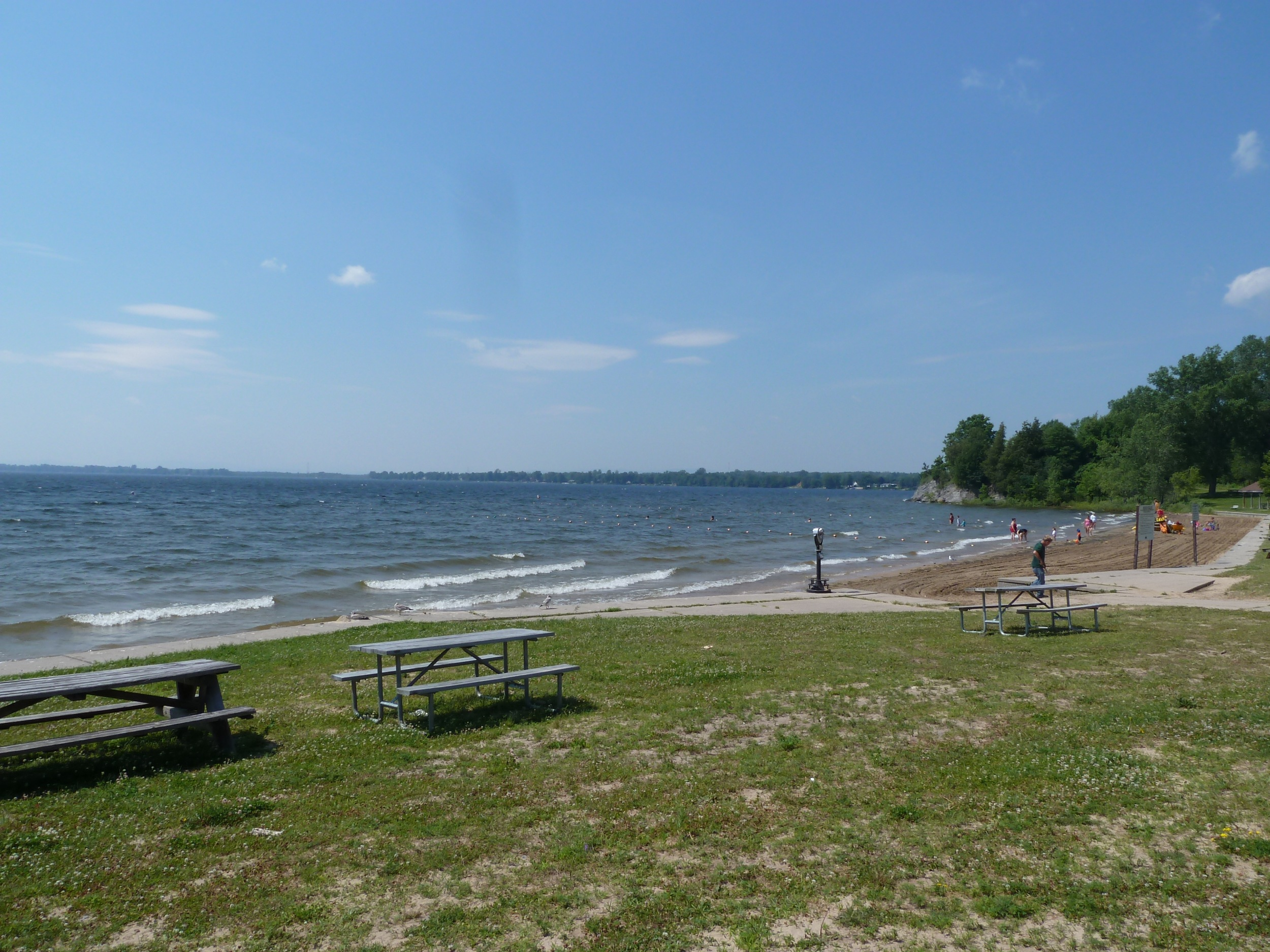 Point Au Roche State Park